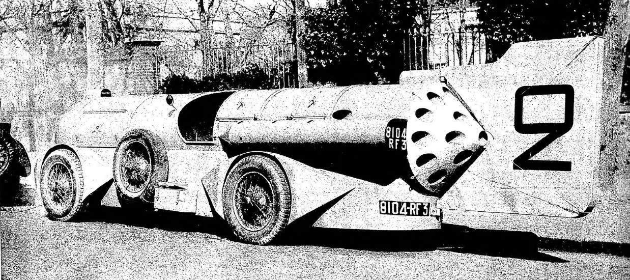 Véhicule « Jupiter » (au châssis Voisin) de R. Strap (1932)